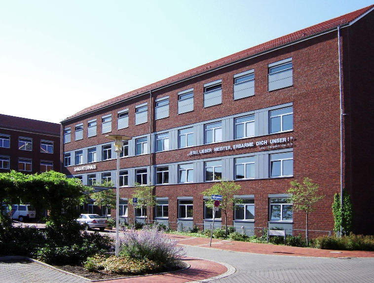 Samariterhaus der Pfeifferschen Stiftungen Magdeburg-Cracau